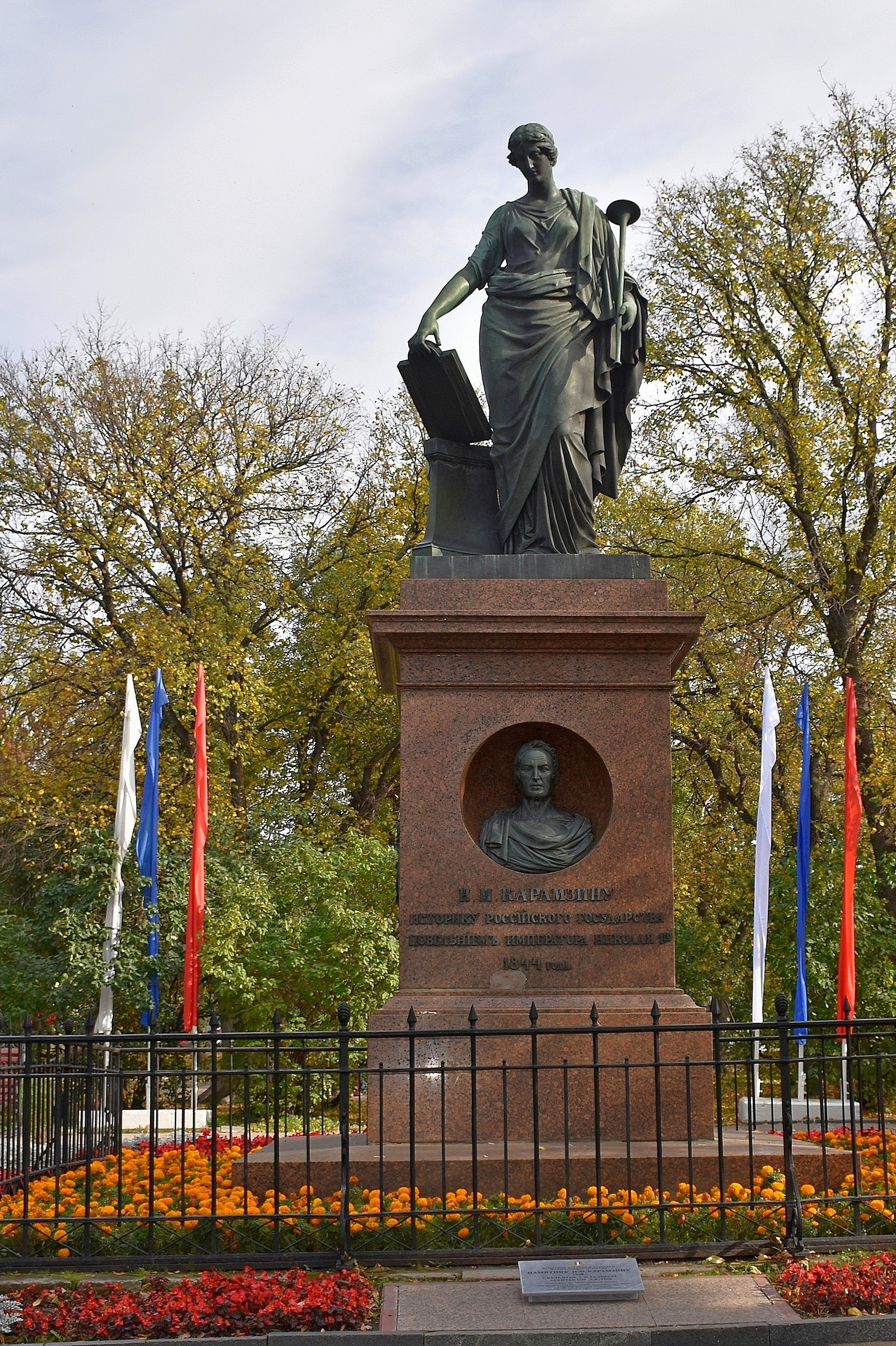 Памятник писателю Карамзину Н.М.: улица Советская, Карамзинский сквер, Ульяновск, Ульяновская область